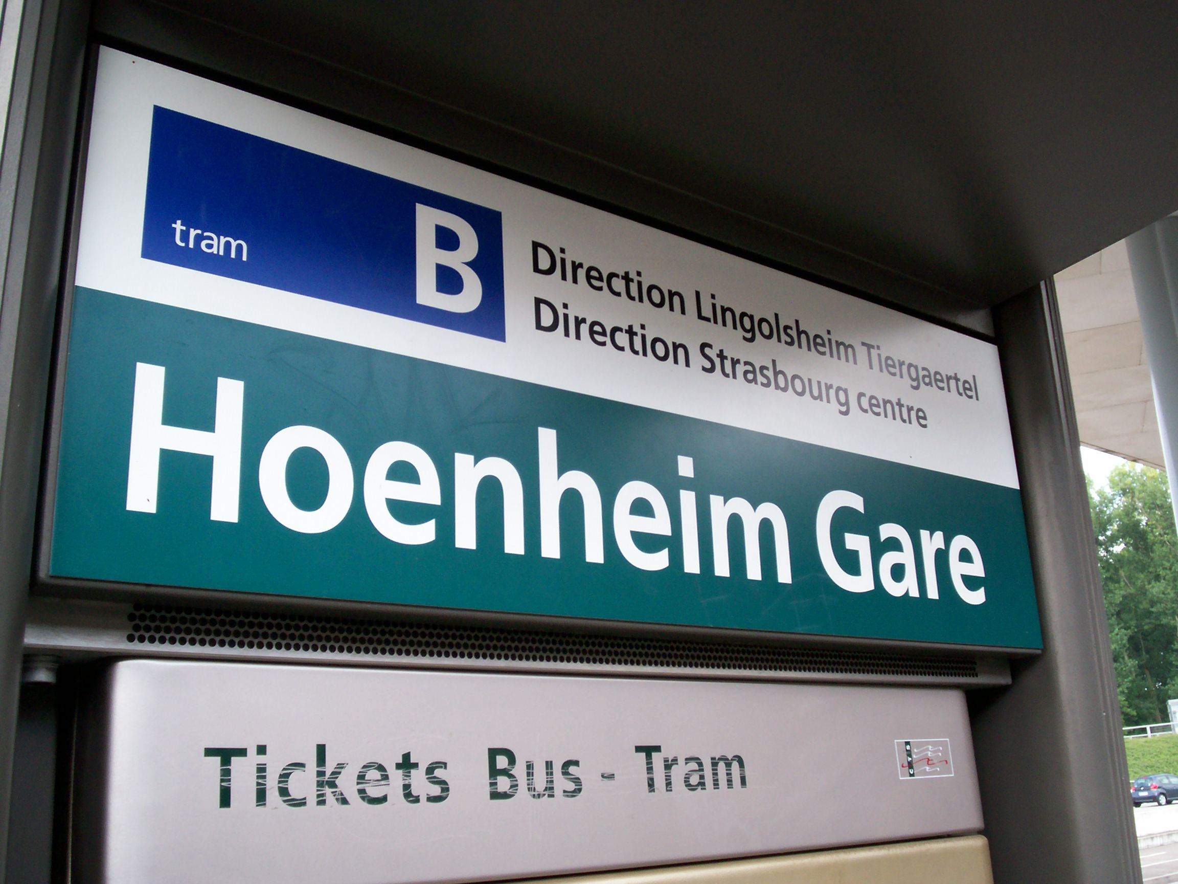 Signalétique à Hoenheim Gare